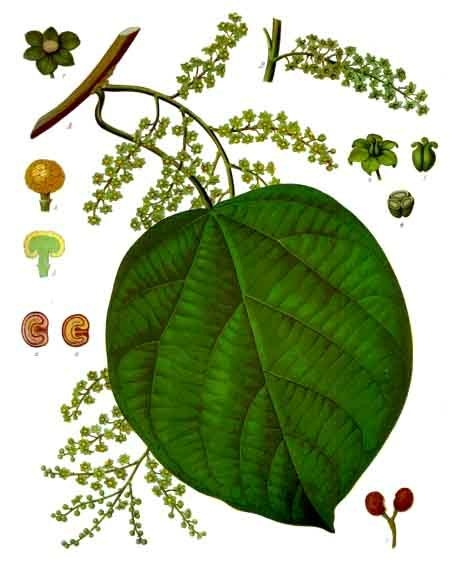 Scheinmyrte. A Aststück mit Blüthenrispe und Blatt, natürl. Grösse; 1 männliche Blüthe, vergrössert; 2 Staubgefässköpfchen, desgl.; 3 dasselbe längsdurchschnitten, desgl.; 4 weibliche Blüthe, desgl.; 5 Carpelle, desgl.; 6 letztere im Querschnitt, desgl.; 7 Früchte, nat. Grösse; 8 und 9 Längs- und Querschnitt des Samens.